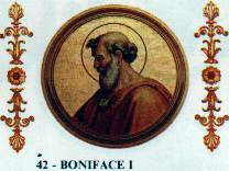 Pope Bonifacius I